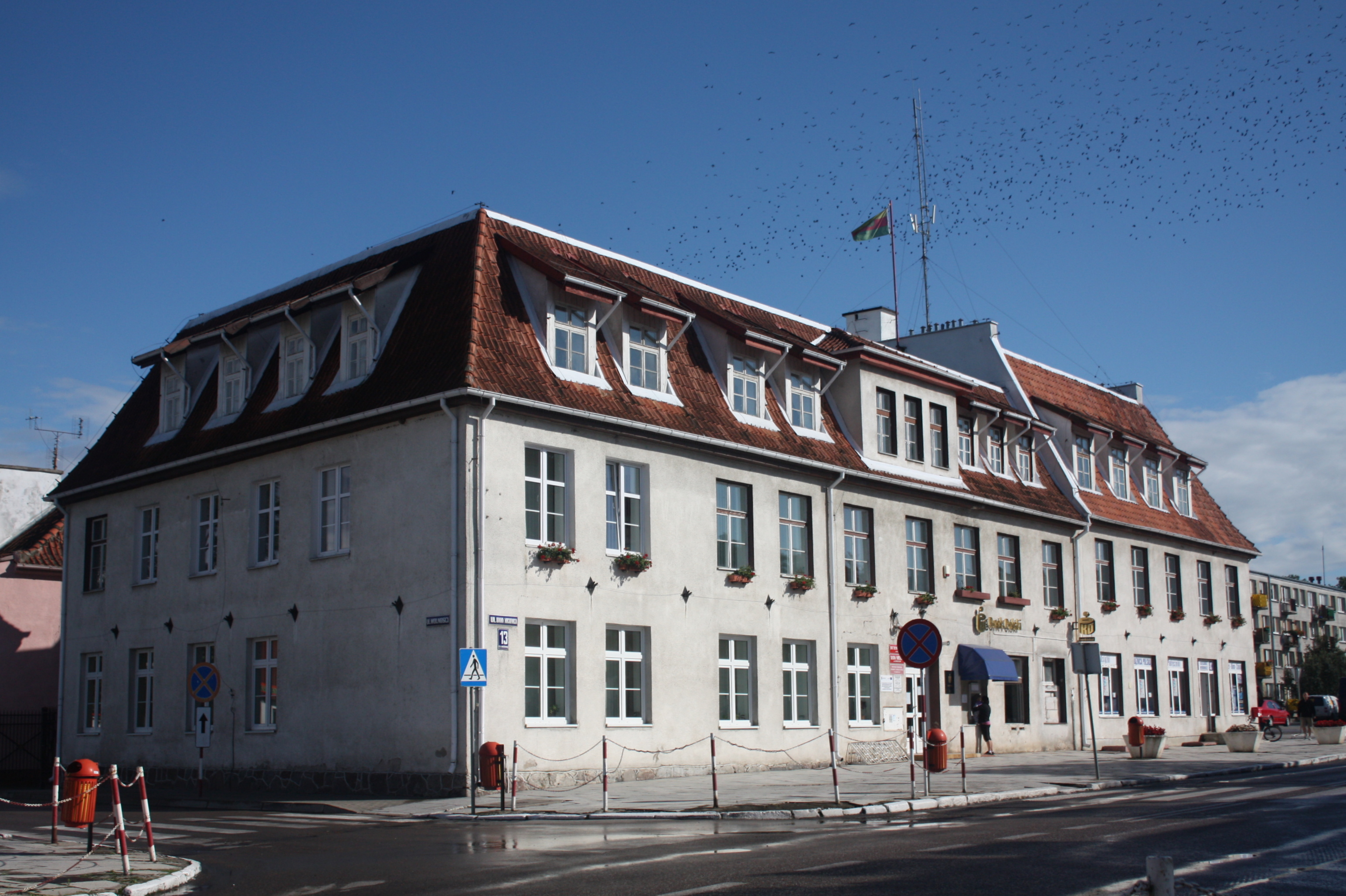 Korsze, ul. Adama Mickiewicza 13 This photo of Warmian-Masurian Voivodeship was taken during Wikiexpedition 2012 set up by Wikimedia Polska Association. You can see all photographs in category Wikiekspedycja 2012. The making of this document was supported by Wikimedia Polska.